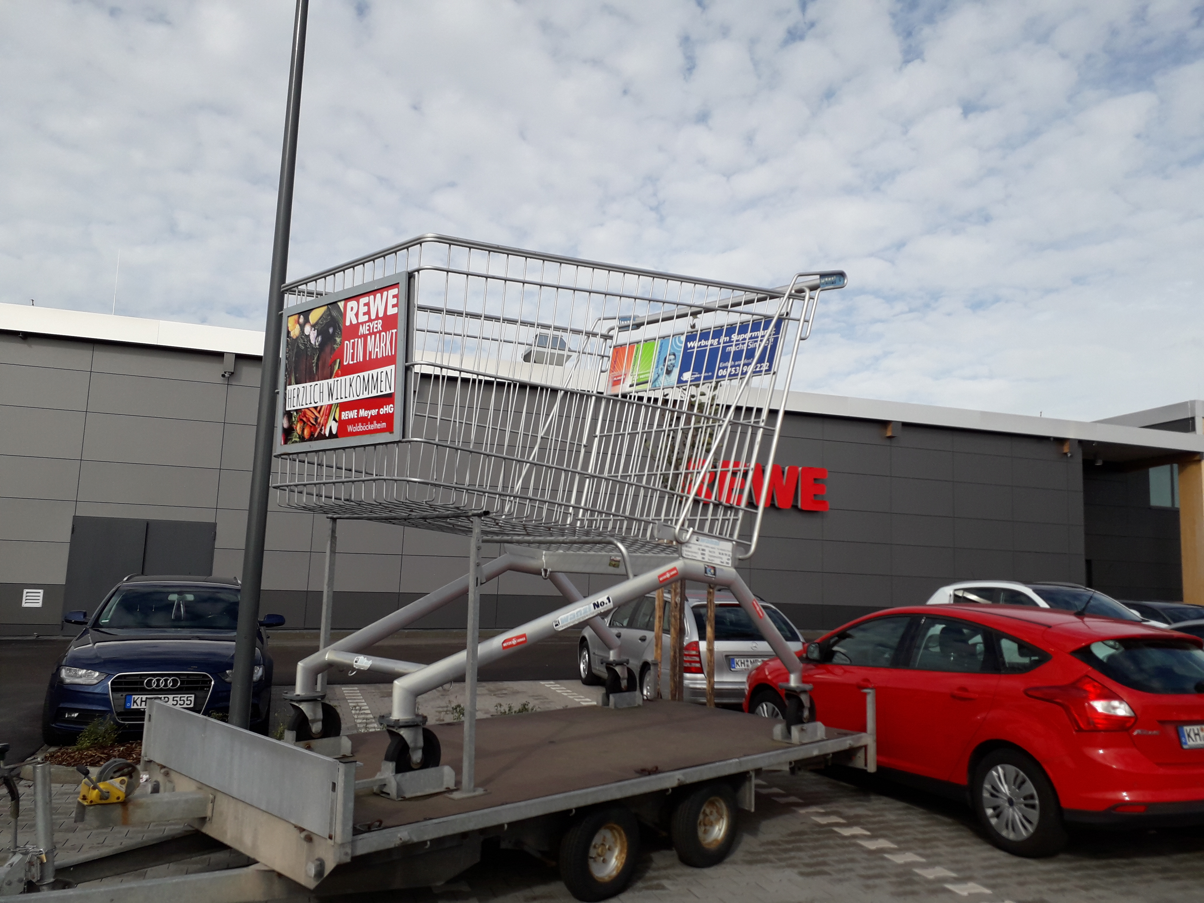 Das neue Einkaufszentrum an der B41